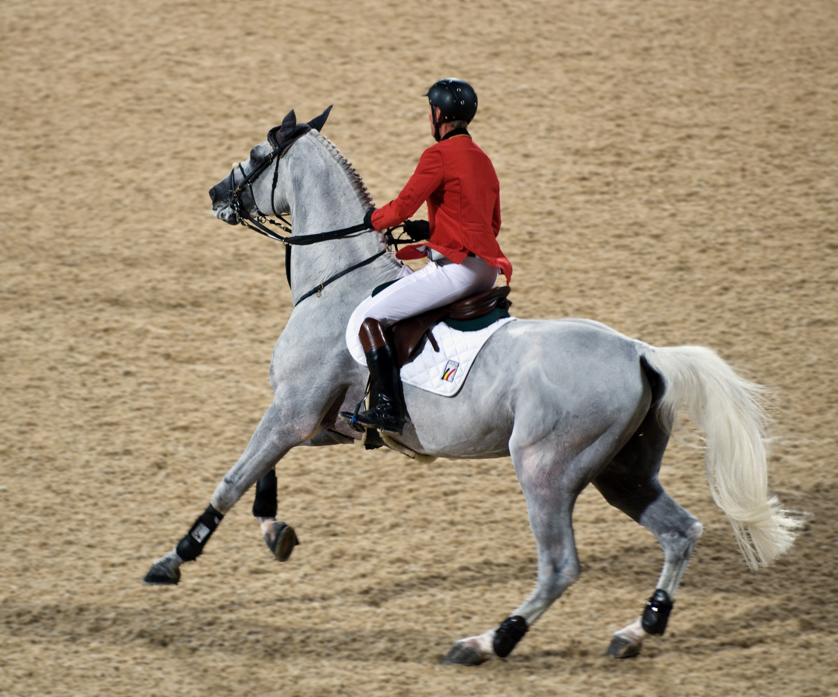 Olympic Equestrian Jumping in Hong Kong.